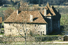 vieux chateau de Voissant